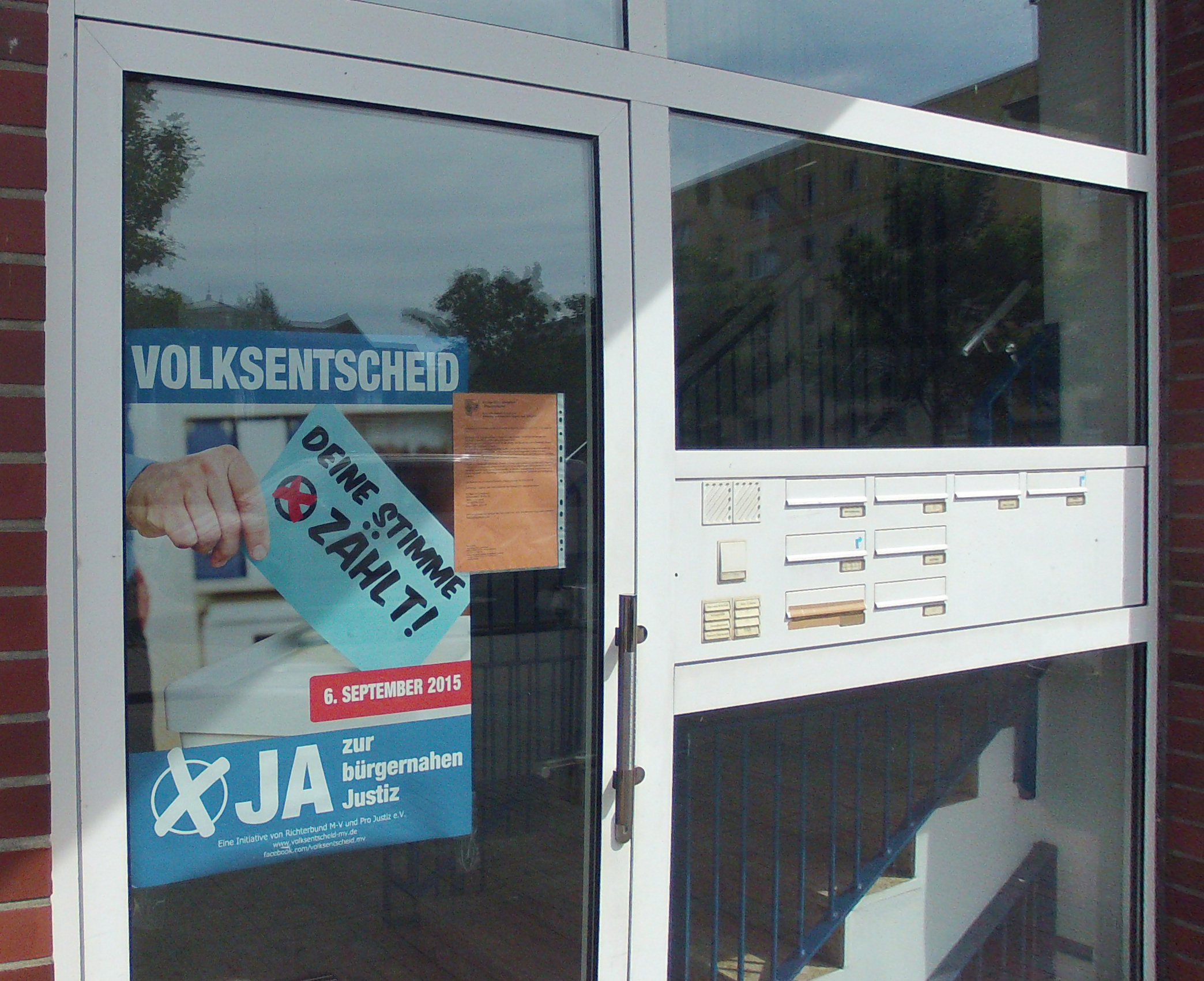 Eingang zum Gebäude des ehemaligen Amtsgerichts Hagenow in der Möllner Straße mit Plakat der Befürworter des Volksentscheides gegen die Gerichtsstrukturreform